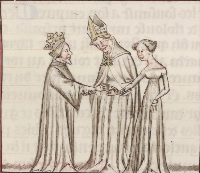 Mariage de philippe auguste et ingeburge de danemark